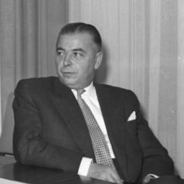 Le ministre-président du Land de Sarre (1959-1979) Franz-Josef Röder (1909-1979), en 1961 à Bonn, à la délégation du Bade-Wurtemberg, au cours de la conférence des ministre-présidents.